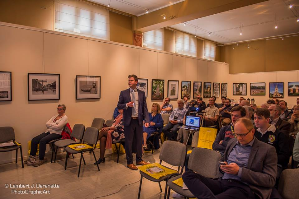 Voorstelling Digitaal Museum voor Vlaanderen door Raf Praet, directeur van VOS. Foto van Lambert Derenette